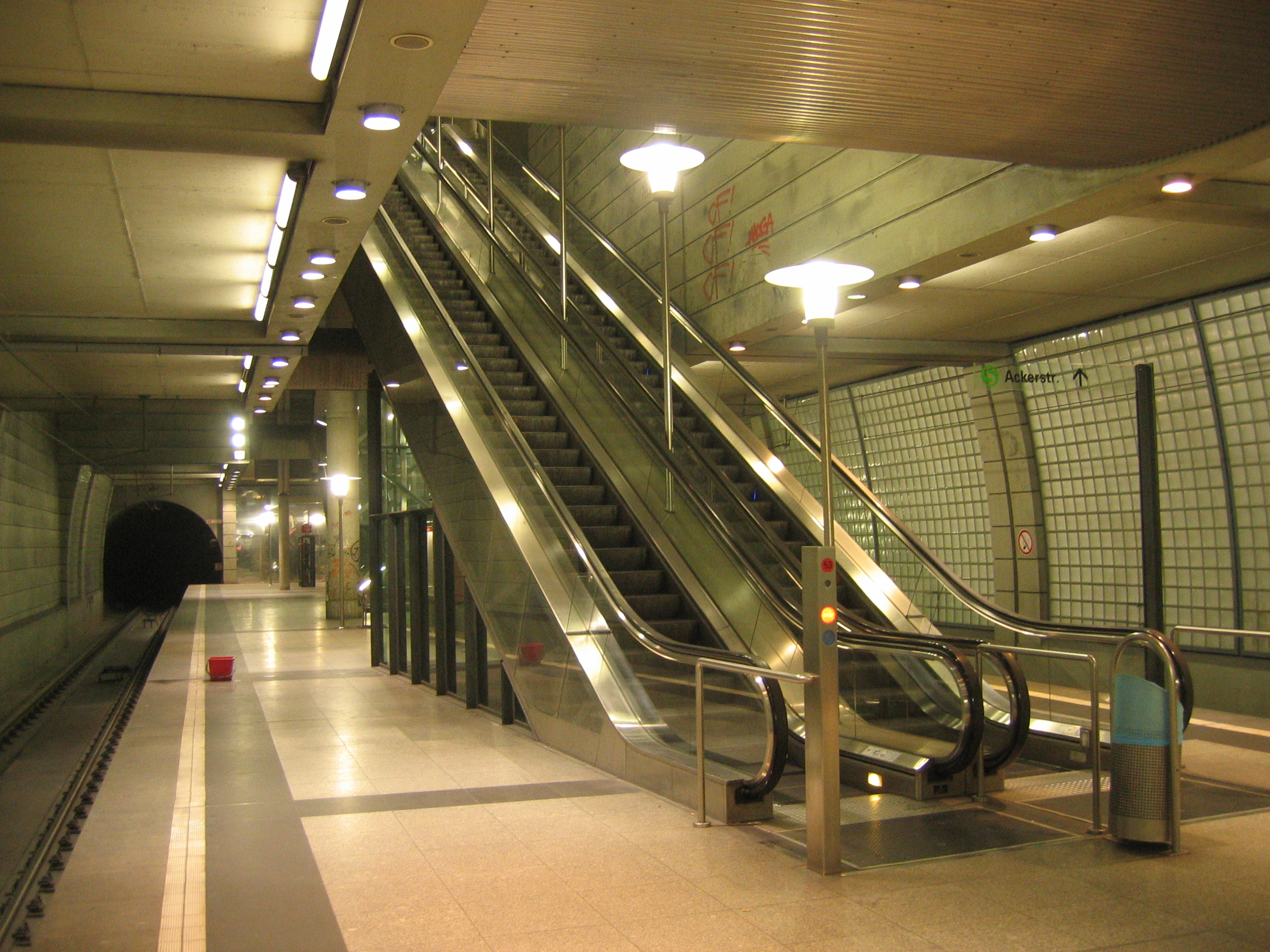 U-Bahn-Station Bf Mülheim der Stadtbahn Köln